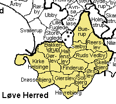 Løve Herred Holbæk Amt , Denmark. Map by Svend-Erik Christiansen, edited by user:Nico-dk .